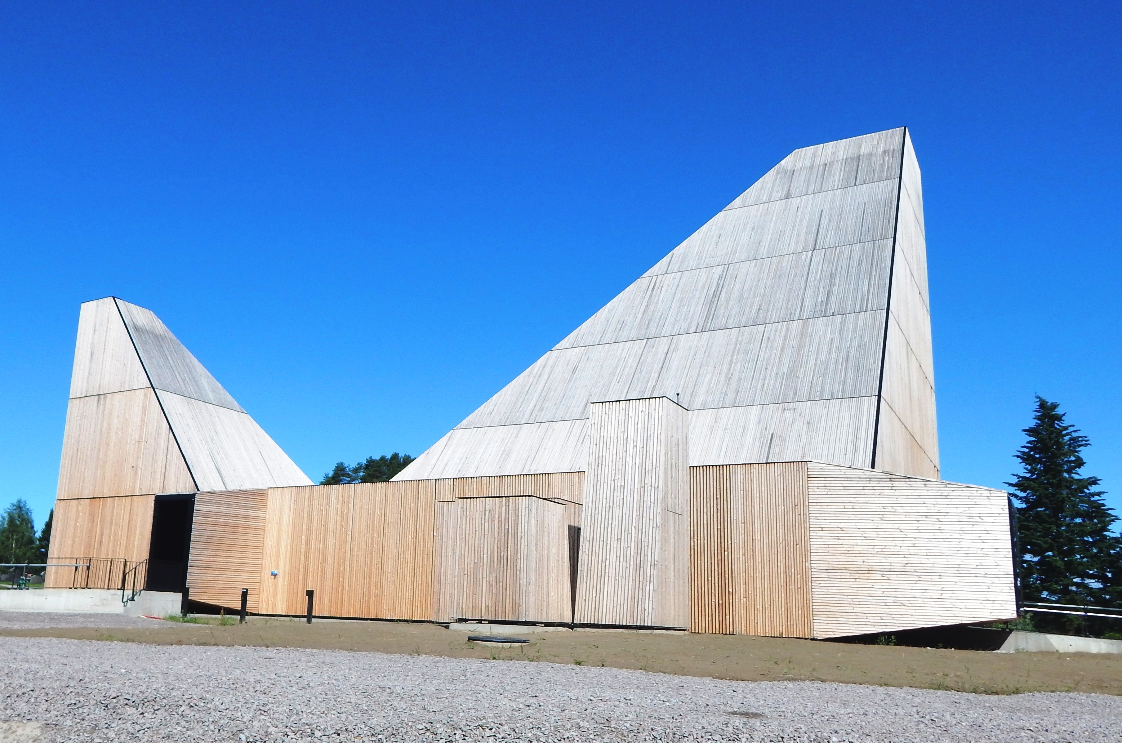 Våler kirke anno 2015